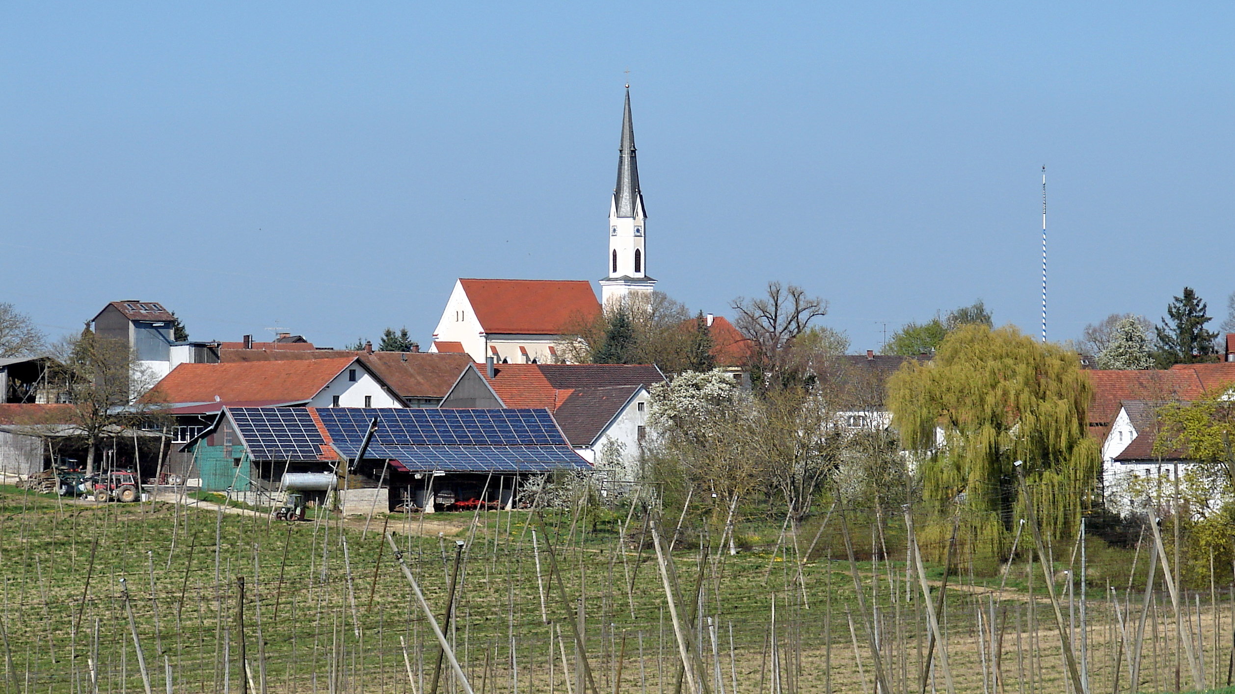 Reichertshausen ist ein Ortsteil des Marktes Au in der Hallertau in Oberbayern.